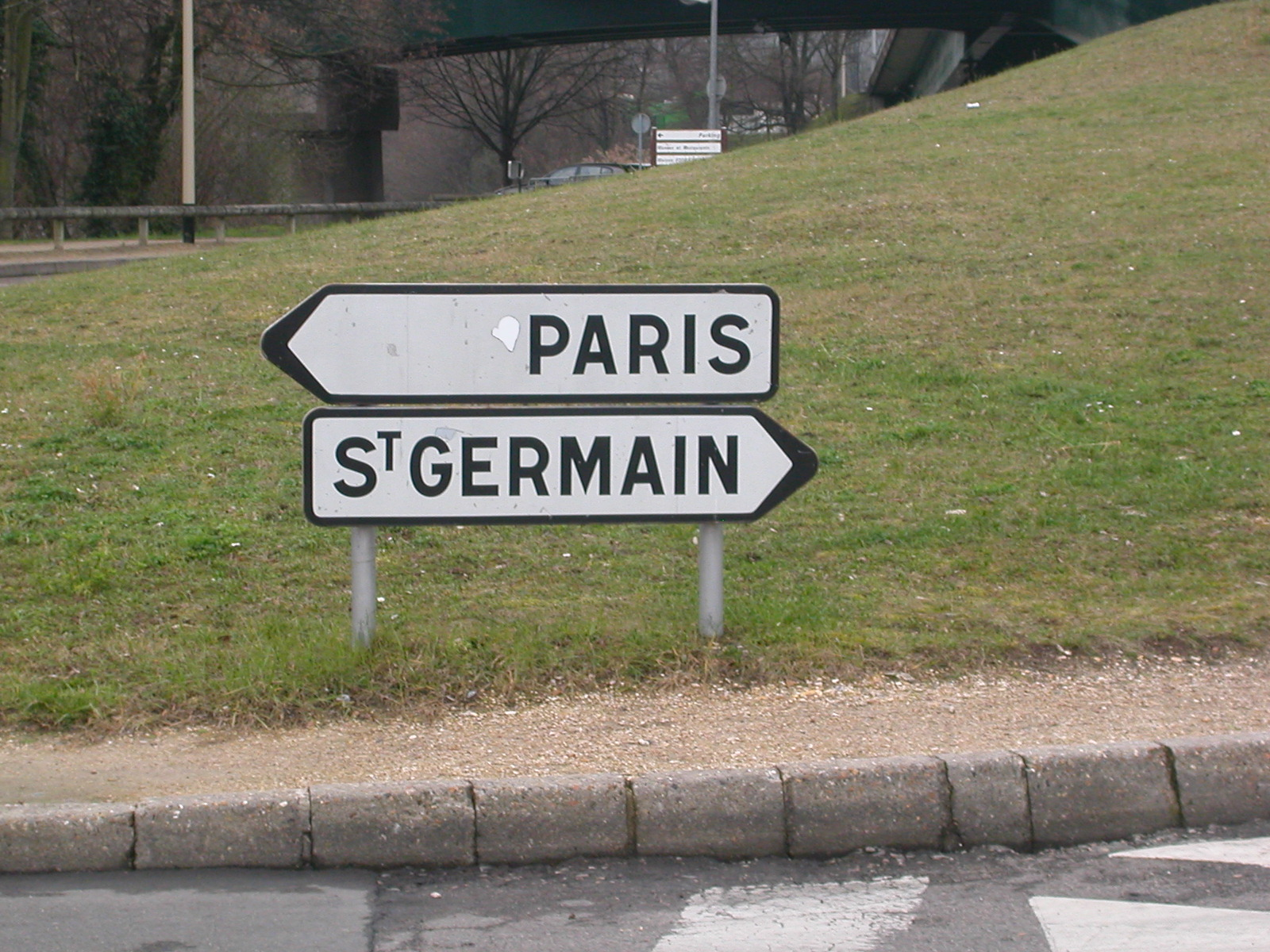 Certains vont droit au but, d'autres ne savent pas où aller... Panneaux indicateurs à Chatou